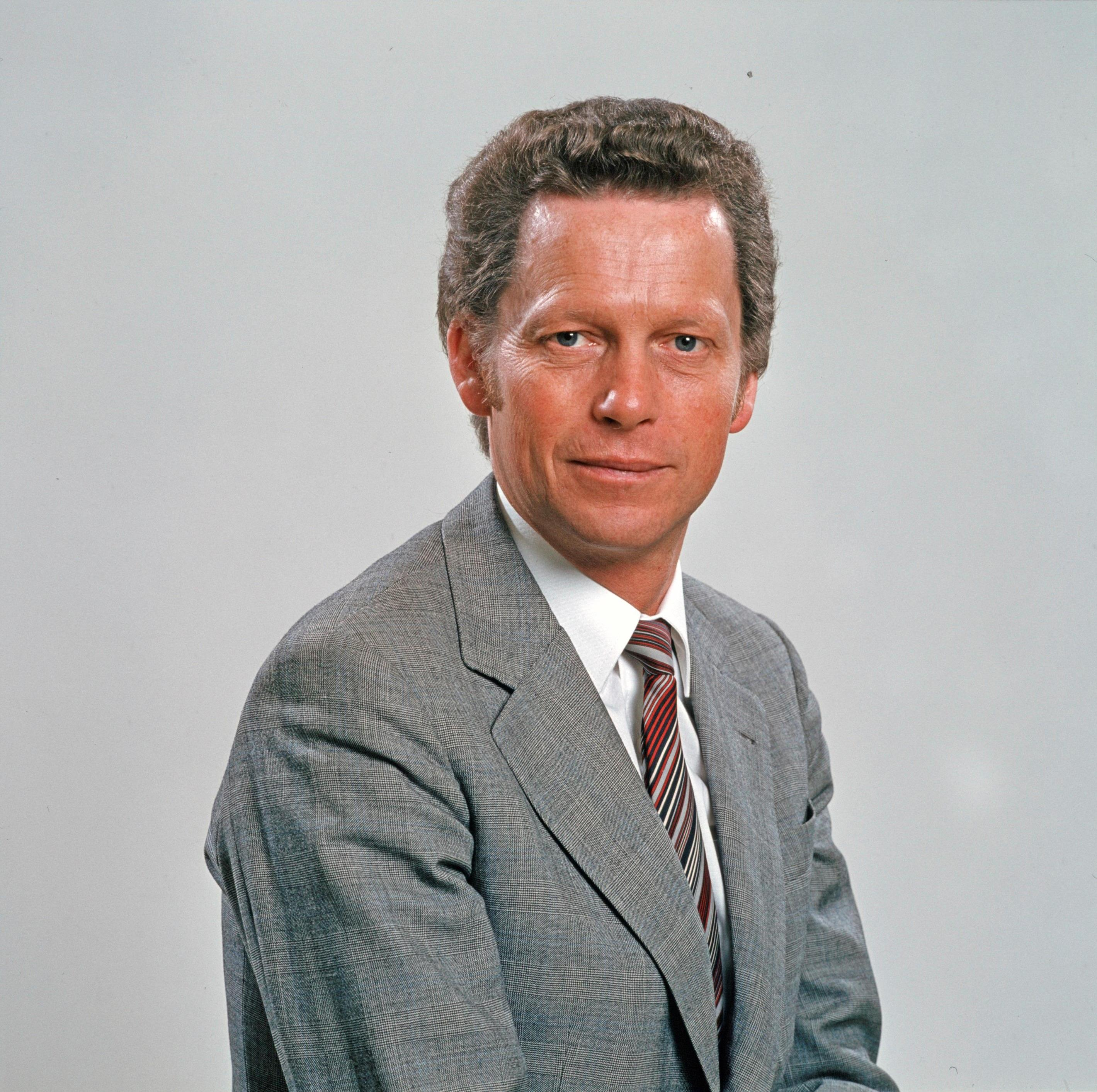 Karl-Werner Rüsch war Landesrat in der Vorarlberger Landesregierung von 1976 bis 1984. Dies ist eine offizielle Portraitaufnahme aus dem Februar 1981.